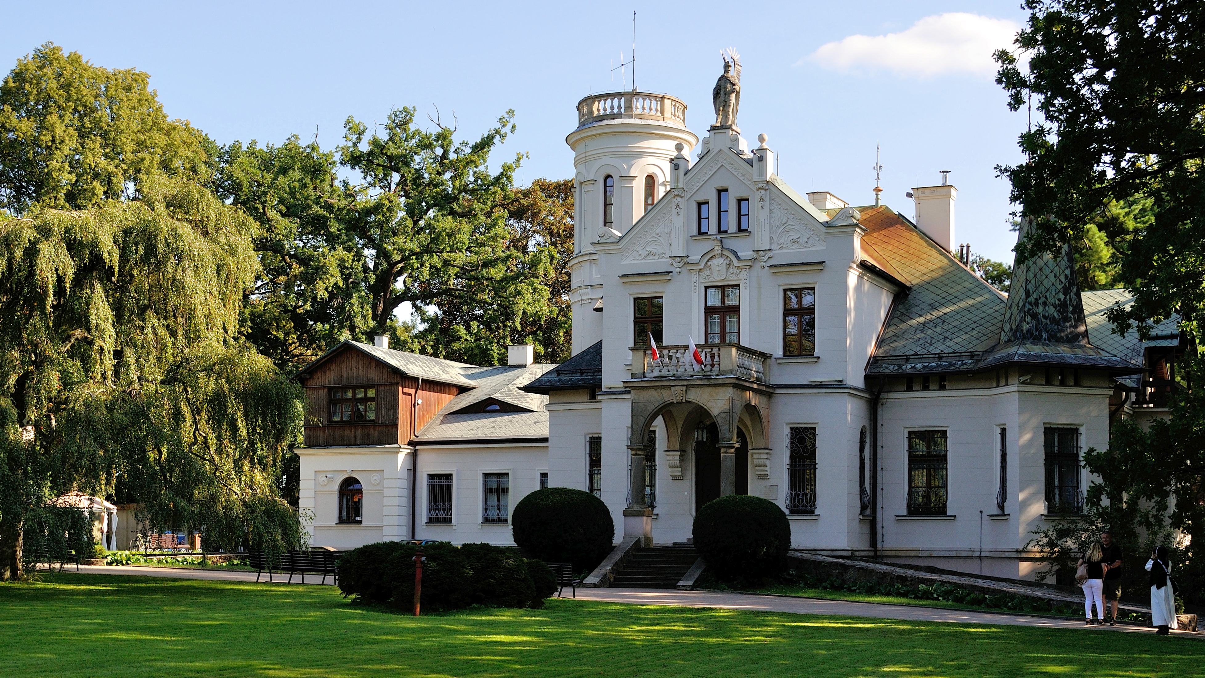 Oblęgorek, Aleja Lipowa 24 - Pałac (obecnie muzeum), 1900